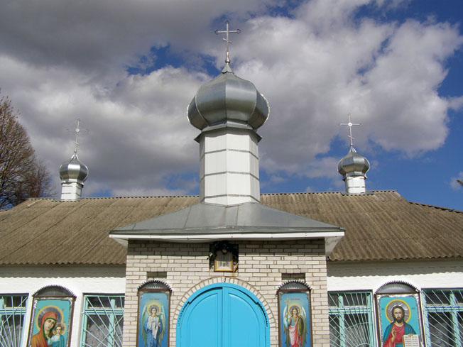 Zgurivka_ts1.jpg: Новозбудована церква у смт Згурівці (райцентр Київської області), квітень 2007 року